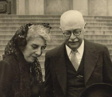 Amélia Peres e José Maria Whitaker durante comemoração de suas bodas de ouro, bem como casamento da neta Maria Lúcia Whitaker com Marcelo de Camargo Vidigal, realizados na Igreja de Santa Cecília.